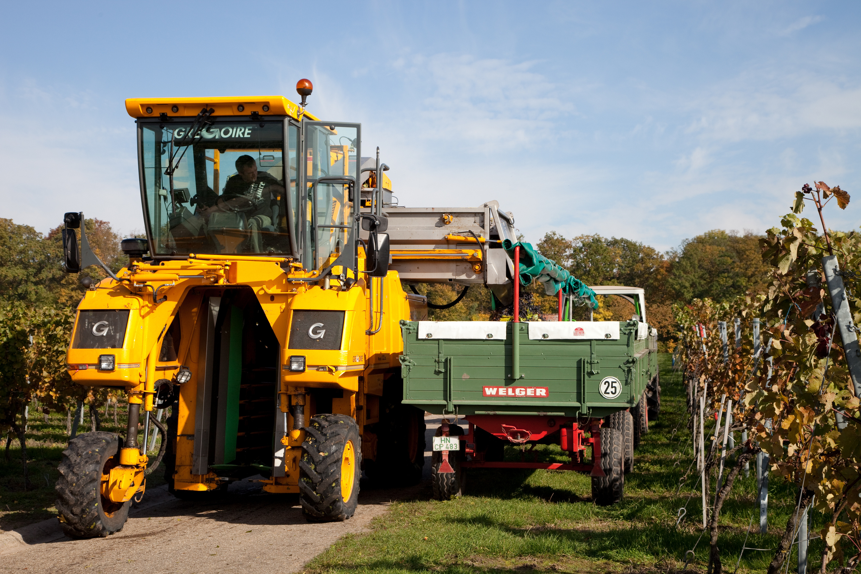 Gregoire grape harvester